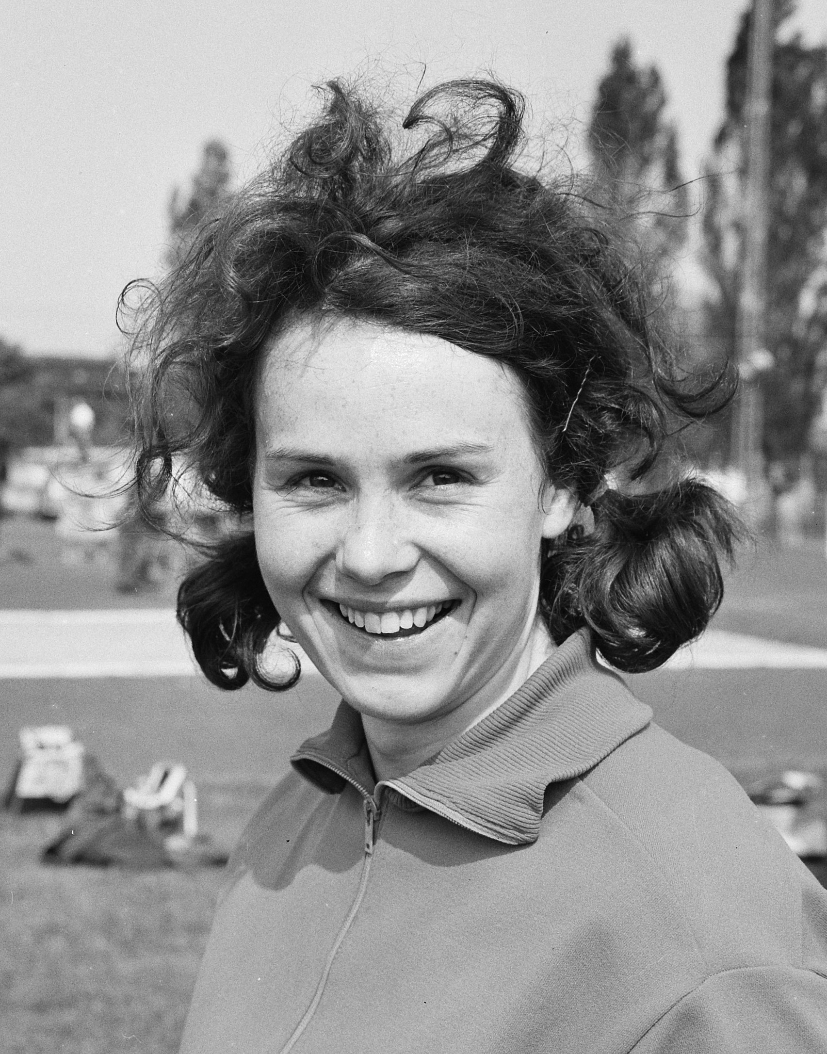 Internationale atletiekwedstrijden, Lia Hinten (kop)